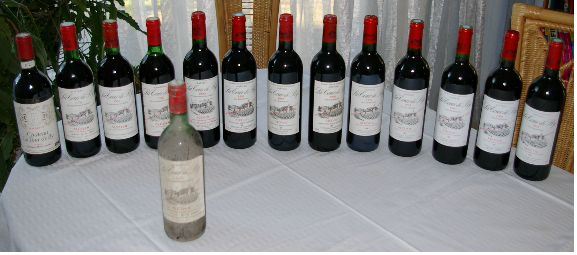 Weine des Château La Tour de By v.l.n.r. von 1975, 1979, 1981, 1982, 1990, 1994, 1995, 1995 CdP, 1996, 1997, 1998, 1999, 2000, 2001 / Im Vordergrund eine Rarität von 1977